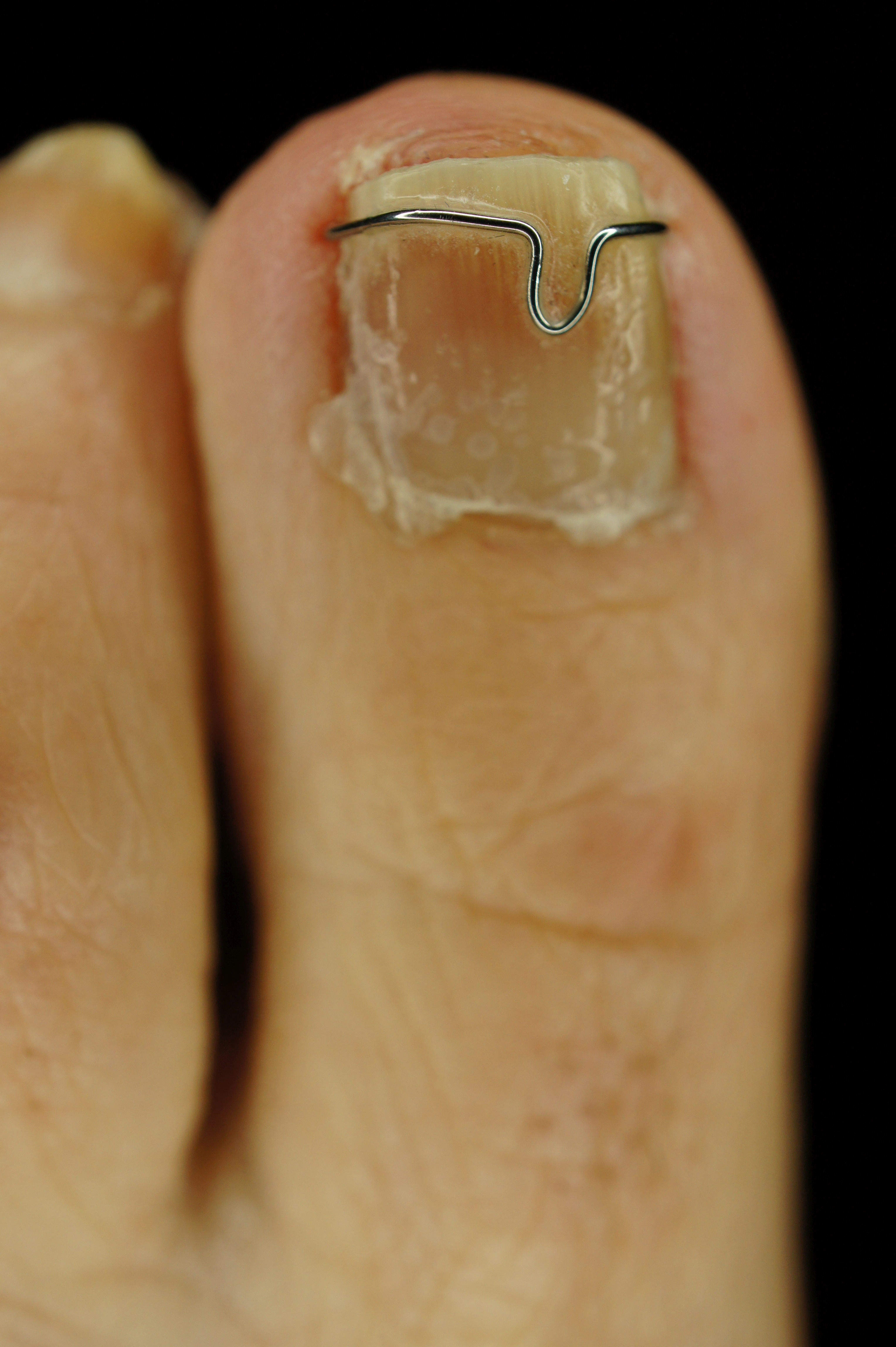 Orthonyxiespange ("Nagelspange") als Alternative zur Nagelkeilexzision